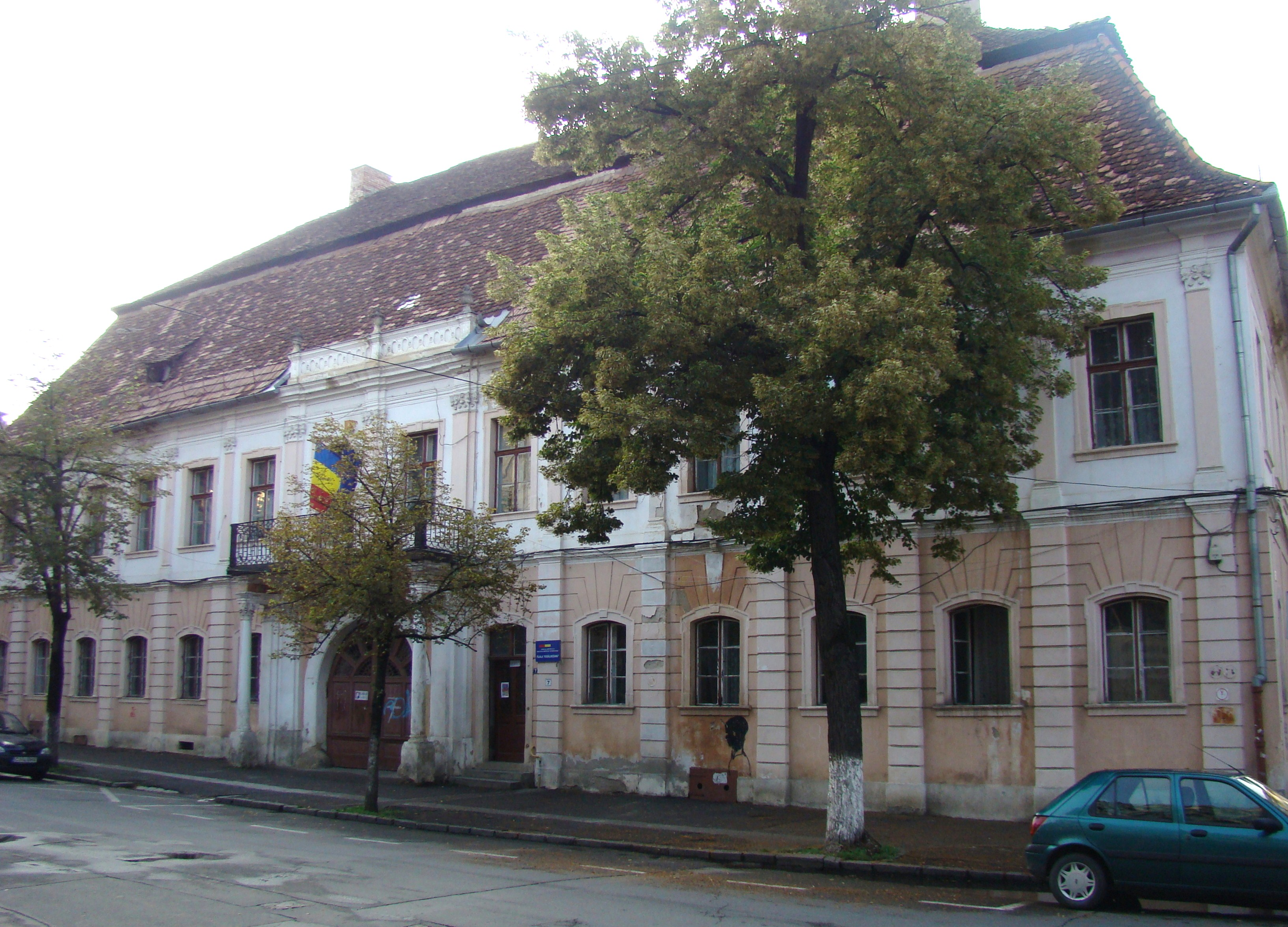 Palatul Teleki